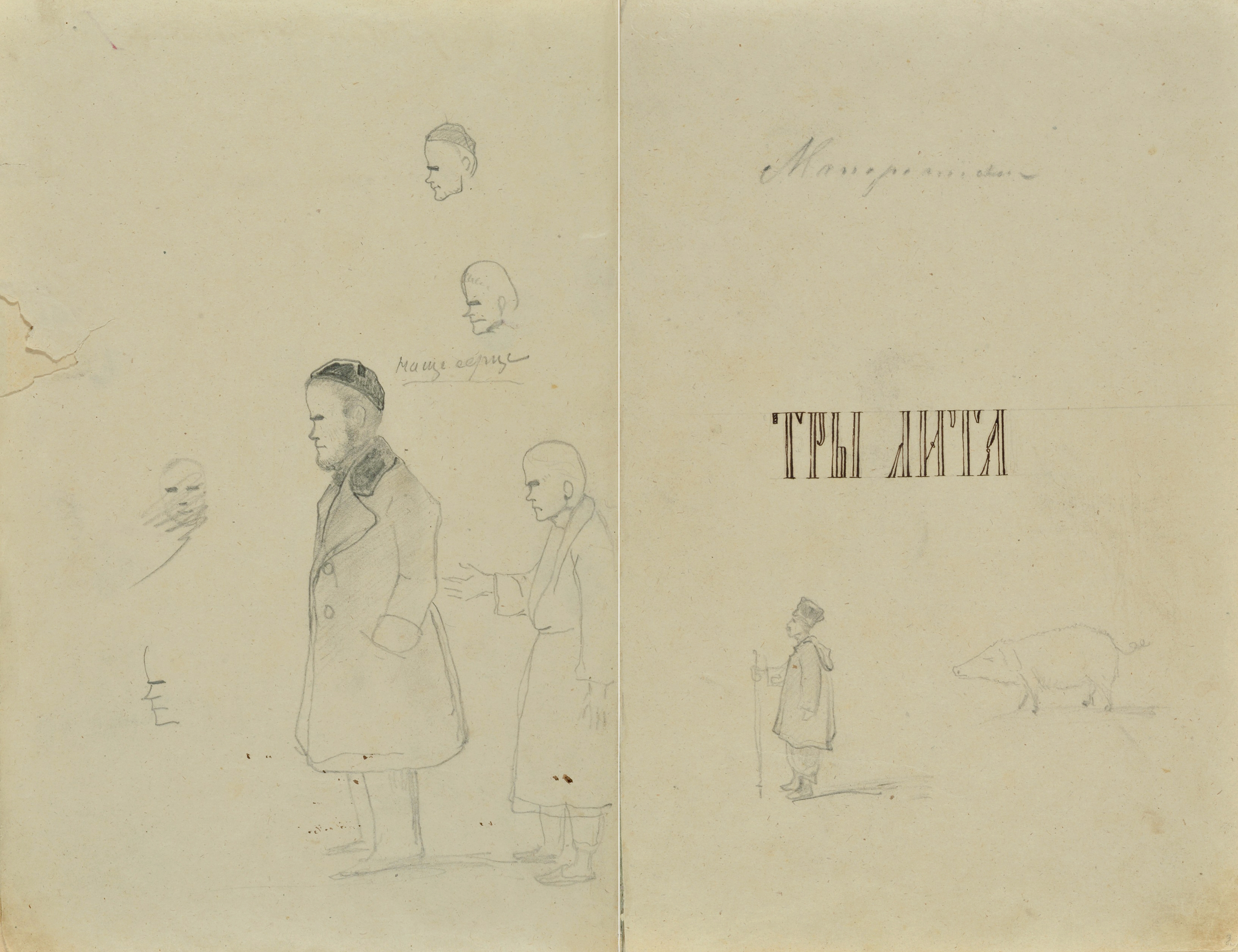 Титульна сторінка рукописної книги Тараса Шевченка 1845 р. «Три літа» (автограф). На фронтисписі — автопортрет Шевченка